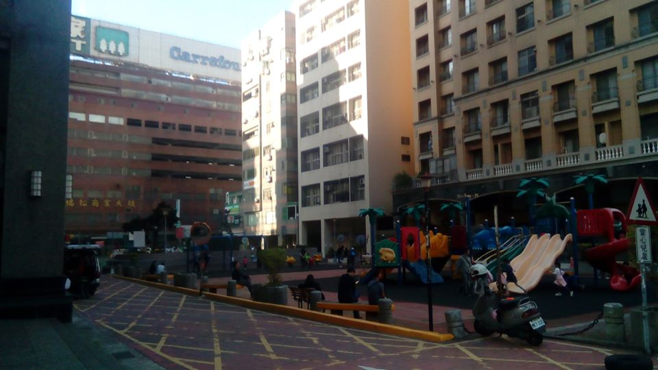 位於竹北市斗崙里 家樂福旁